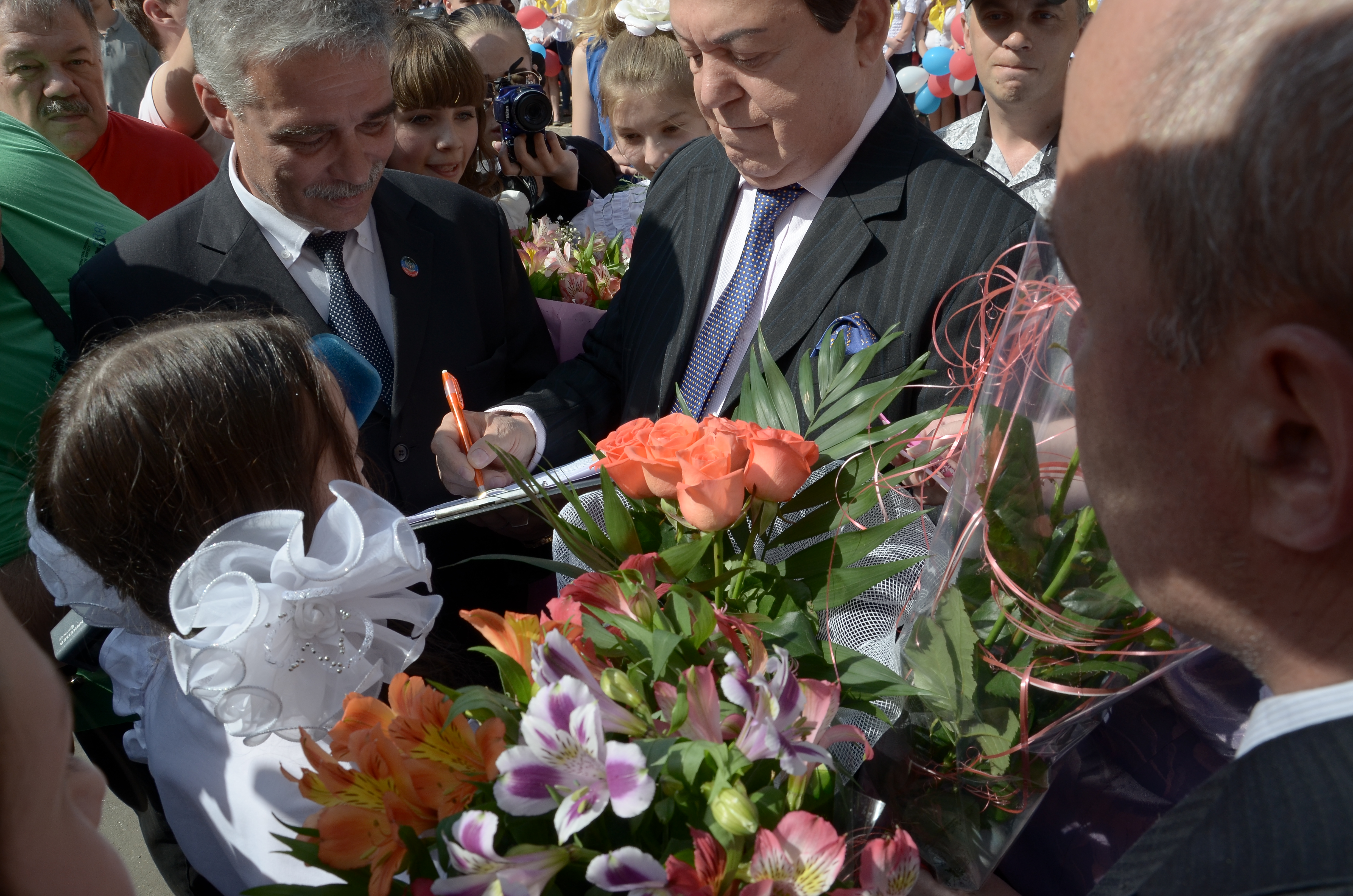 Последний звонок в 47 школе Донецка.